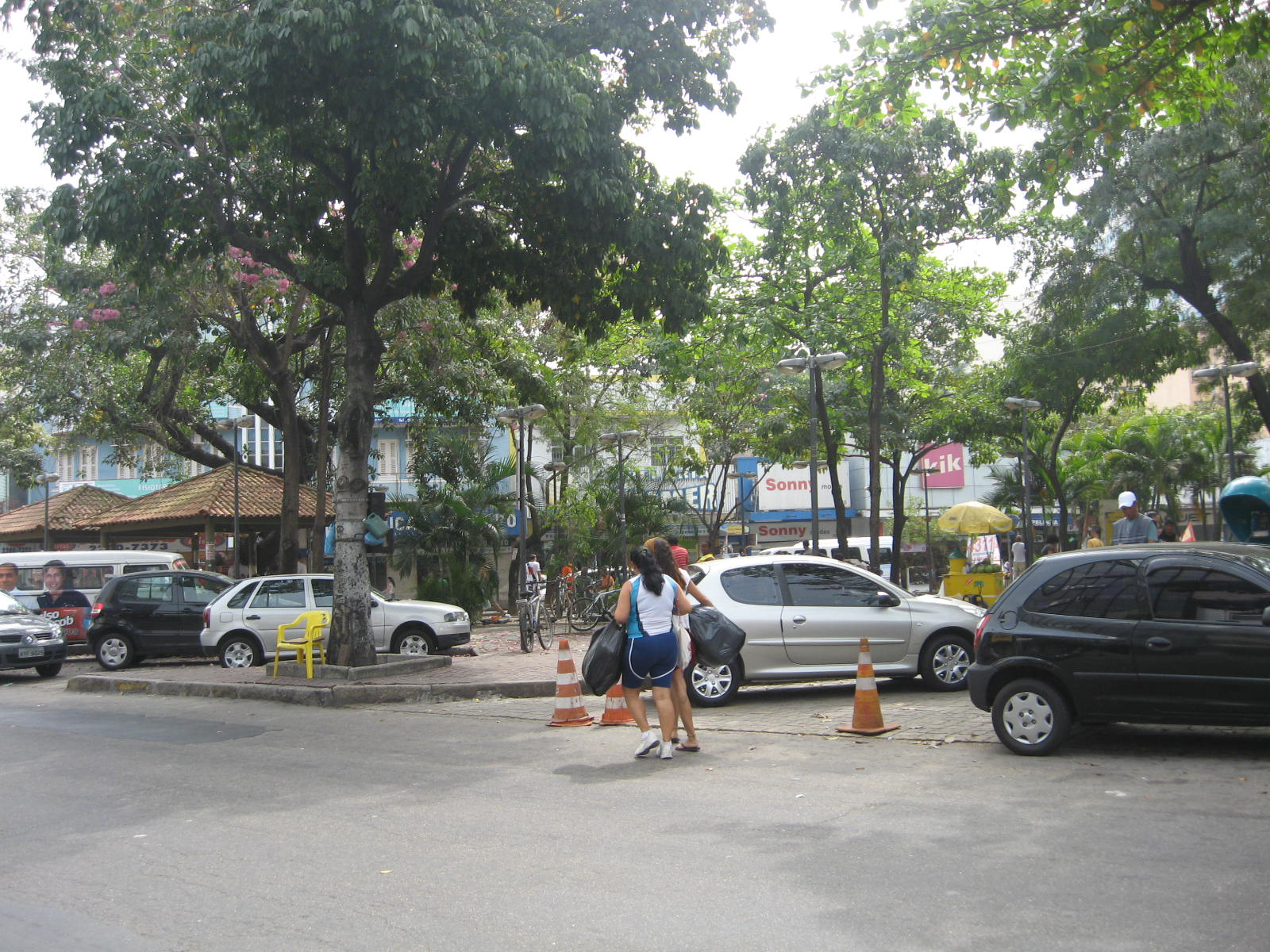 Praça das Nações, localizada no bairro carioca de Bonsucesso, Rio de Janeiro, RJ, Brasil.